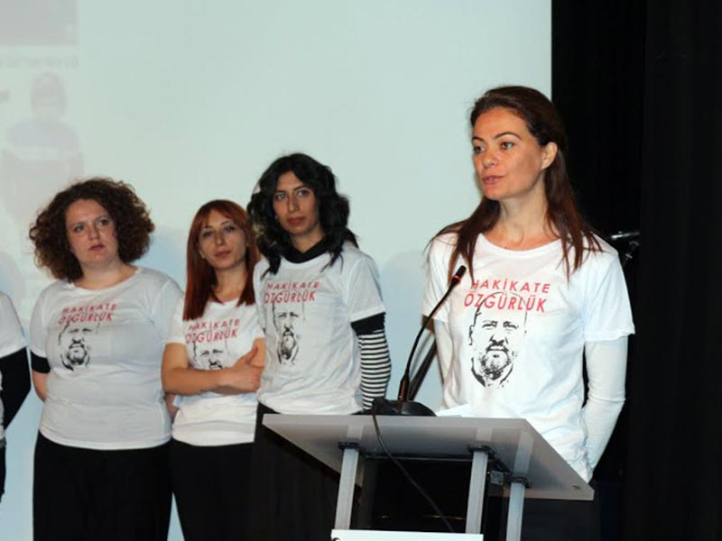 102 gündür cezaevinde bulunan tutuklu gazeteci Ahmet Şık’ın “15 Temmuz’un şifreleri” başlıklı yazı dizisiyle değer görüldüğü Jüri Özel Ödülü’nü gazeteci Elif Ilgaz, Kadıköy Belediye Başkanı Aykut Nuhoğlu’nun elinden aldı. Fotoğraf: Eylem Nazlıer/Evrensel Gazetesi